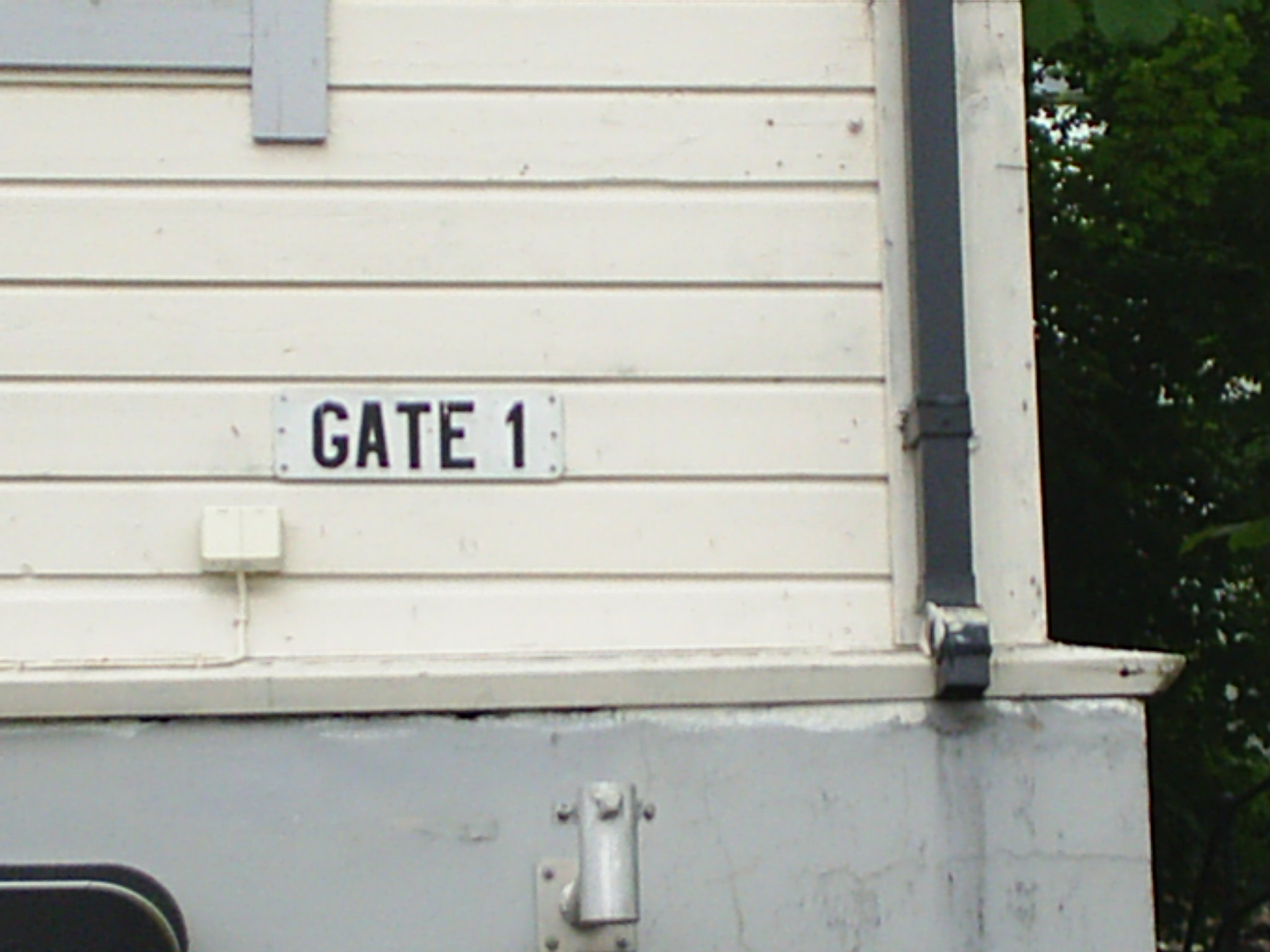 Måløy Street Name